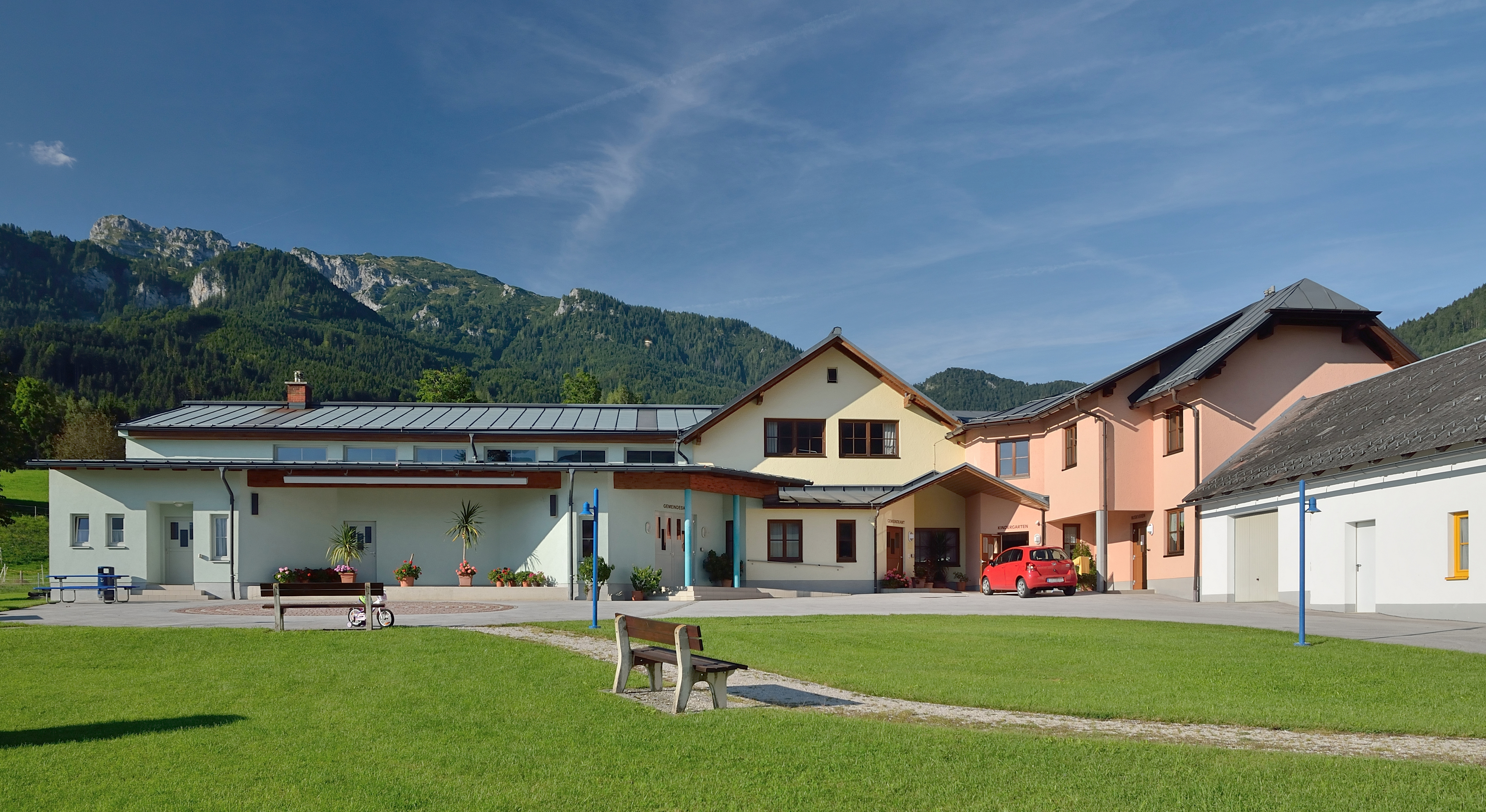 Gemeindesaal - Gemeindeamt - Kindergarten der bis Ende 2014 selbständigen Gemeinde Weng im Gesäuse